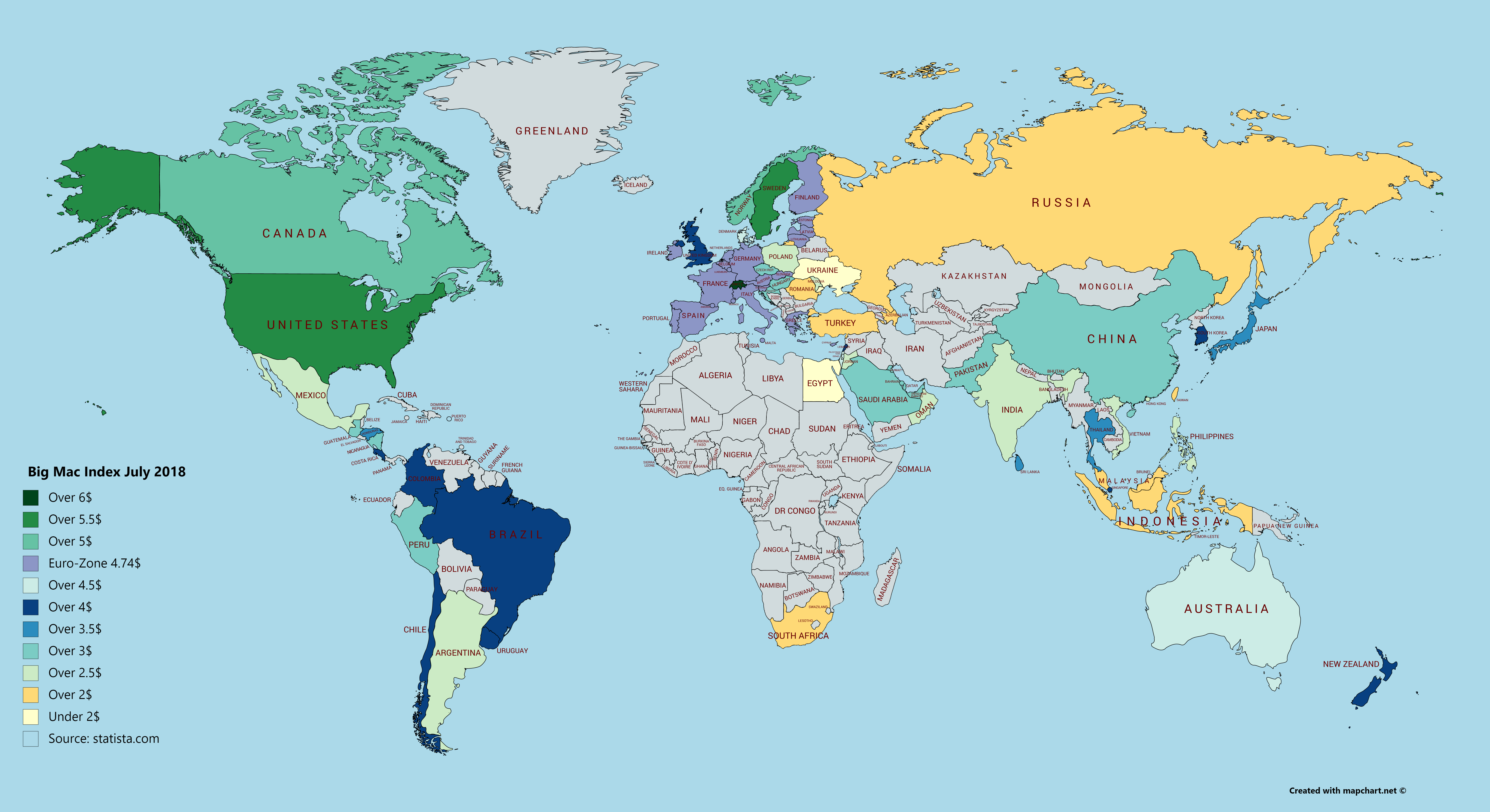 Big mac Index July 2018 based on